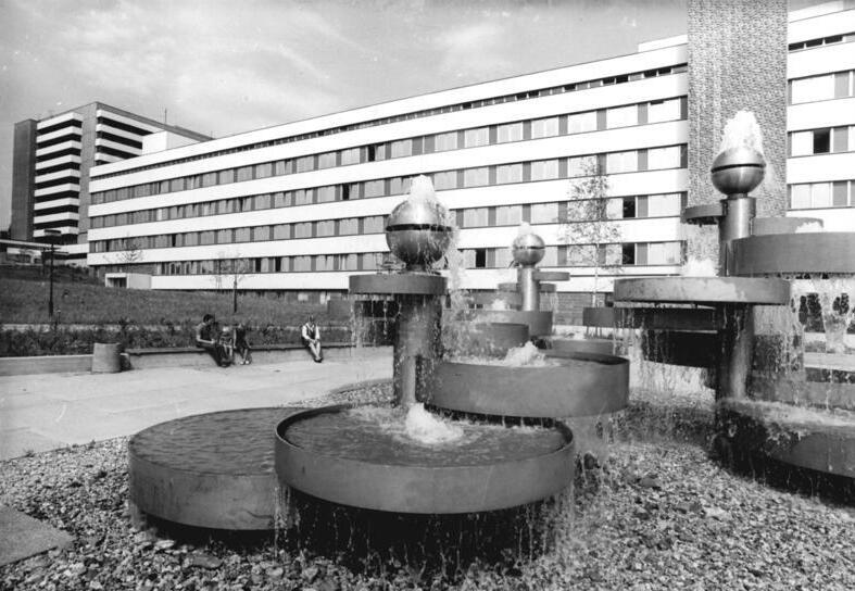 Chemnitz, Poliklinik, Springbrunnen